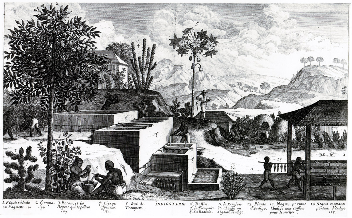 Illustration représentant une indigoterie, extraite du Tome 2 de l'Histoire générale des Antilles, 4 vols, Paris, 1667